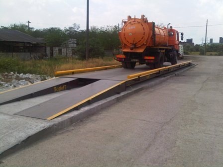 Cantar Auto cu structura integral metalica